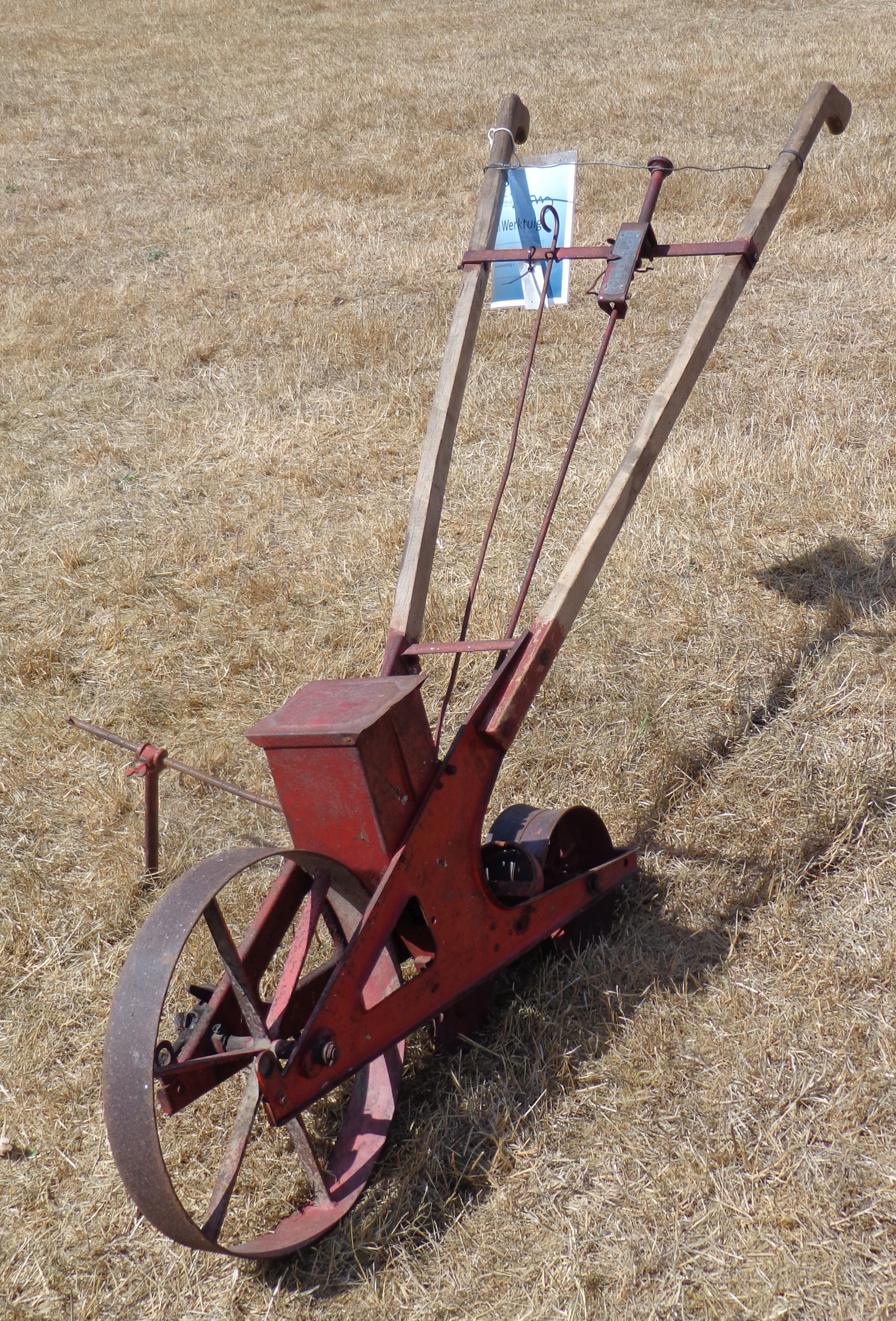 Handzaaimachine op de 24e Oogstdag in De Treek (Leusden)